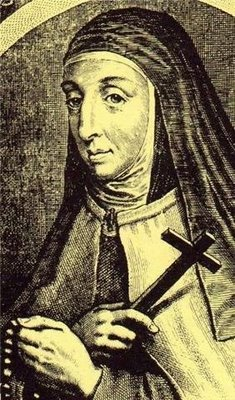 Retrato de Ana de Jesús